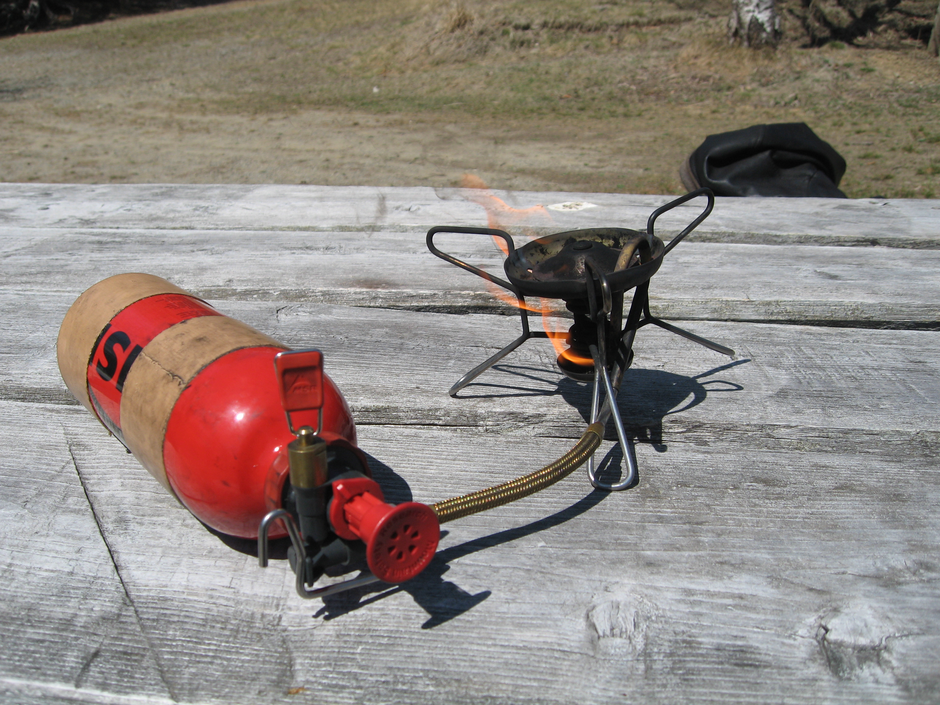 携帯ストーブ(MSR WhisperliteInternational)のプレヒート